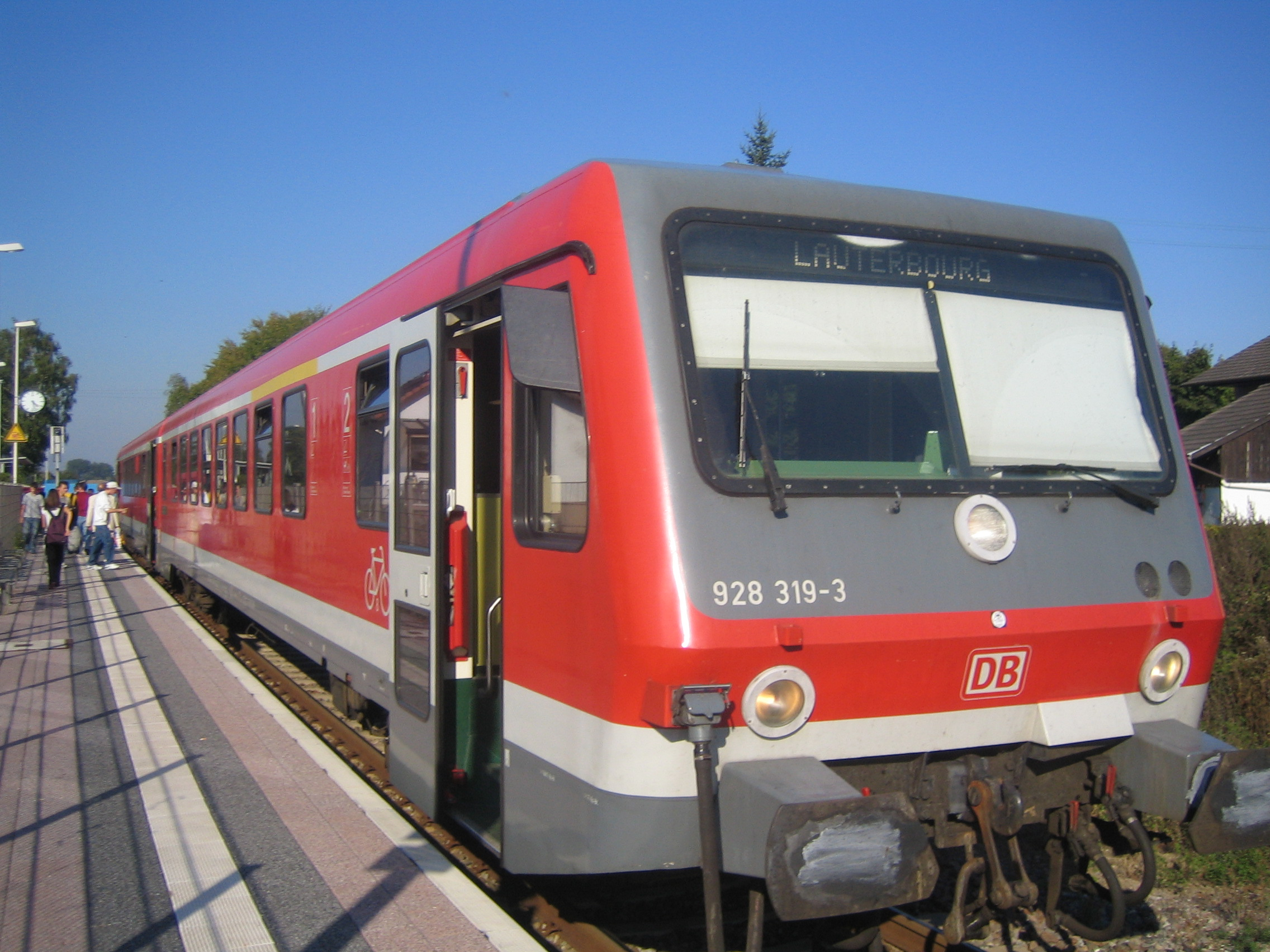 Bf. Hagenbach, selbst fotografiert